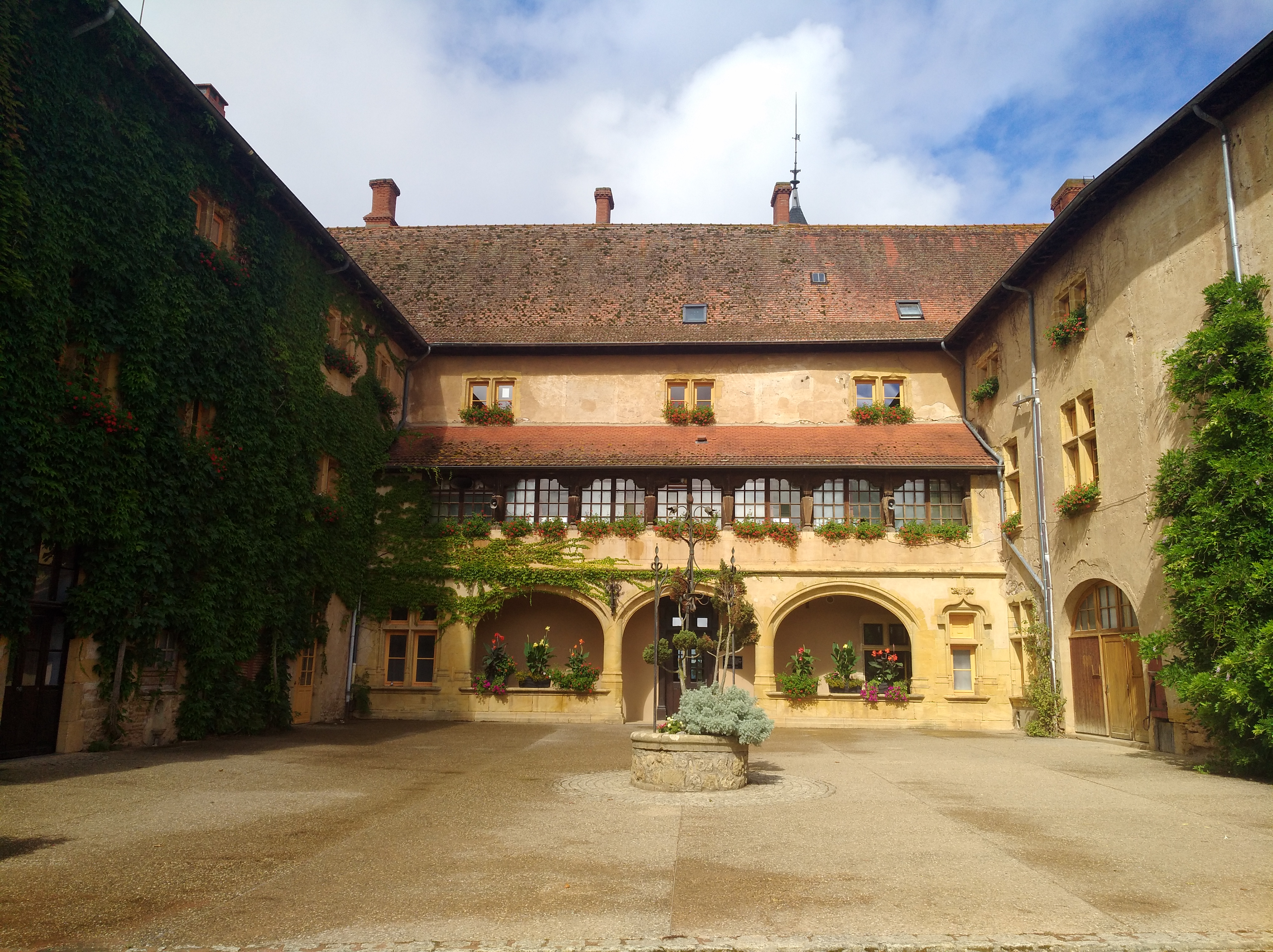 Entrée principale du château de Ressins (commune de Nandax, Loire, France).